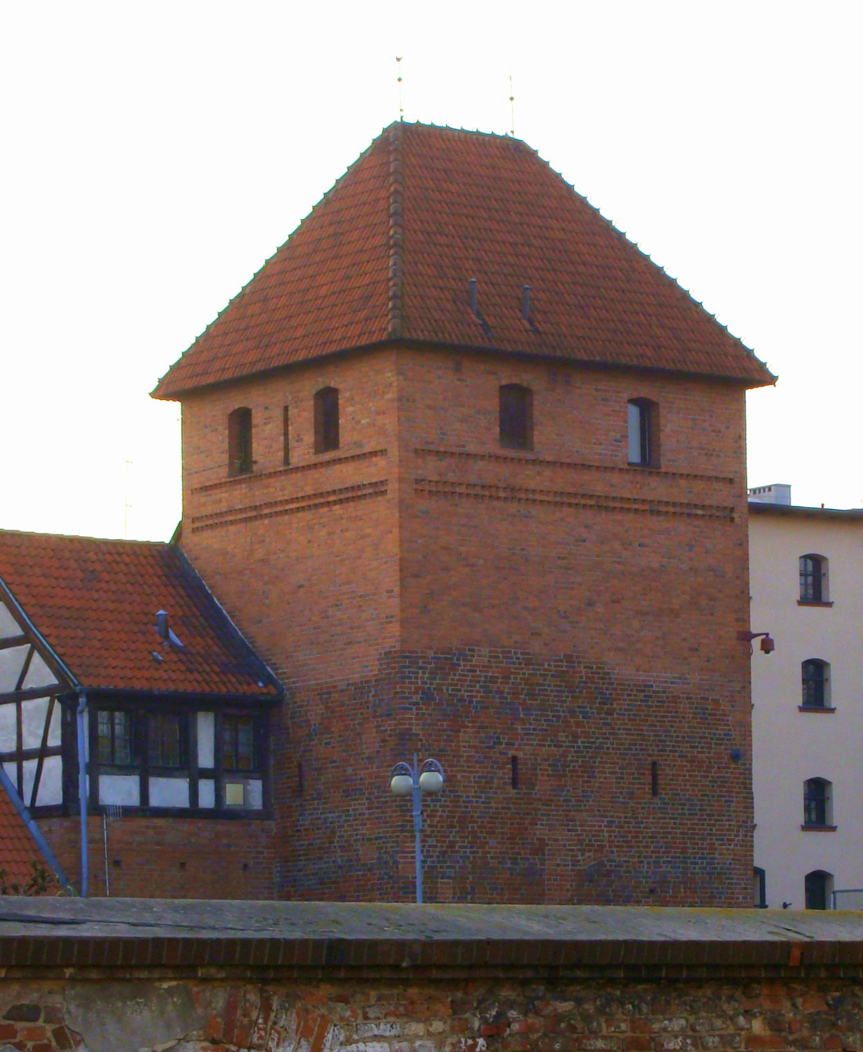 Toruń - staromiejska baszta w zespole murów miejskich, przy ulicy Podmurnej 60, "baszta nr 56" wg. numeracji Jerzego Stankiewicza (zabytek nr A/338)